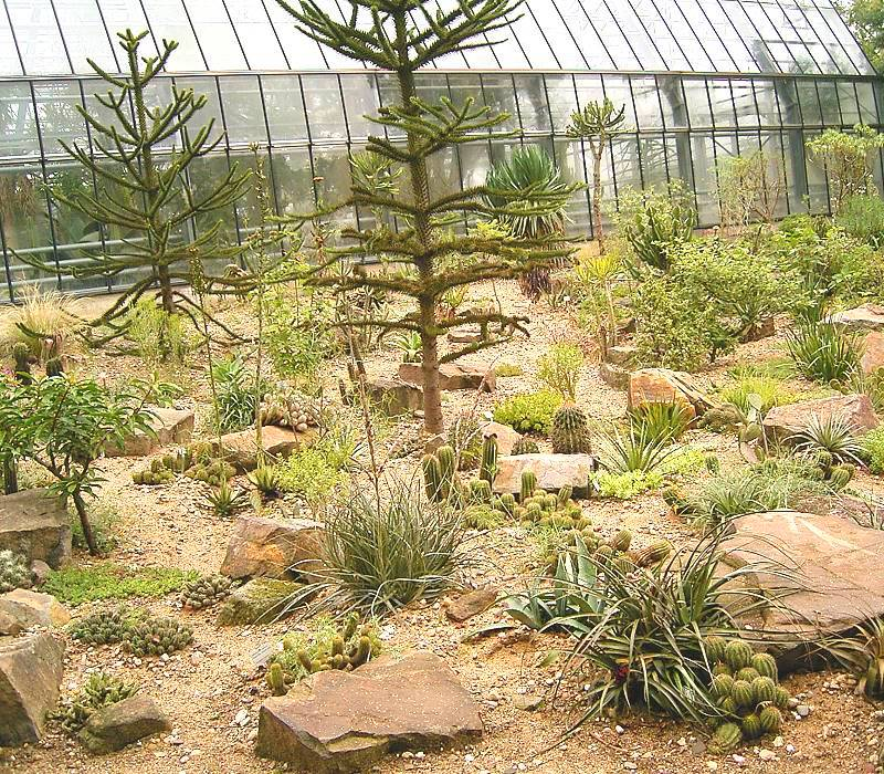 Desert scenery, BG Bochum, Germany